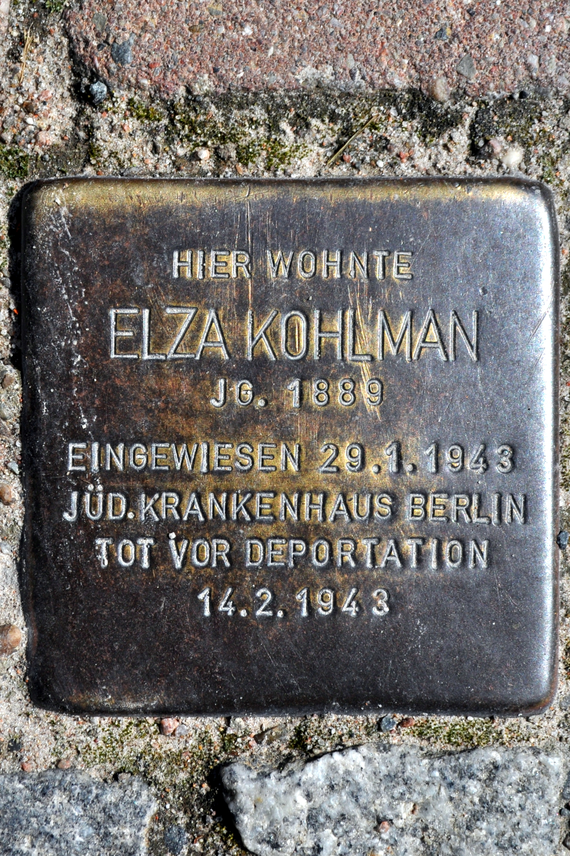 Stolperstein in Ahrenshoop, Ortsteil Althagen, fü Elza Kohlman.